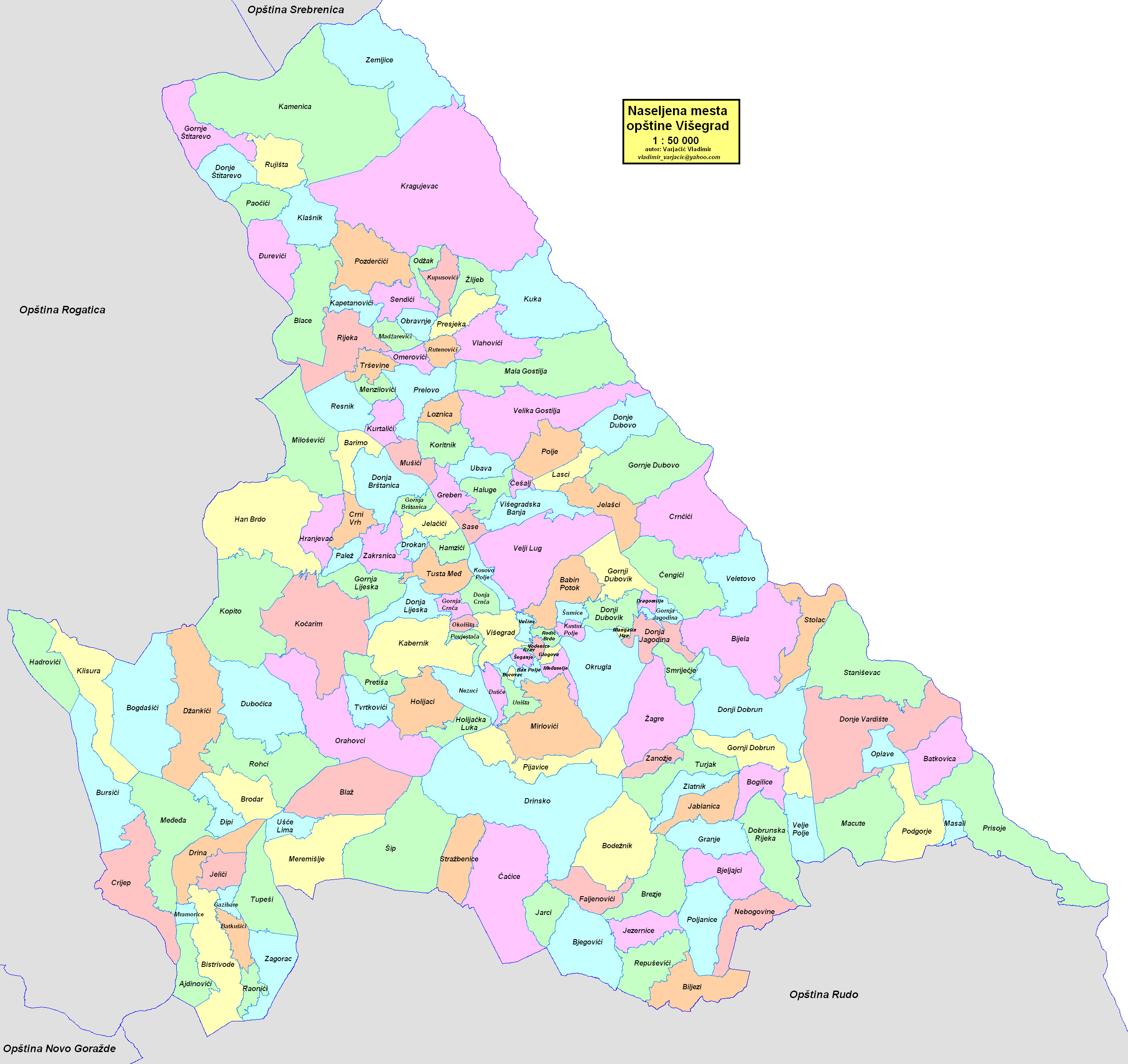 Opština Višegrad